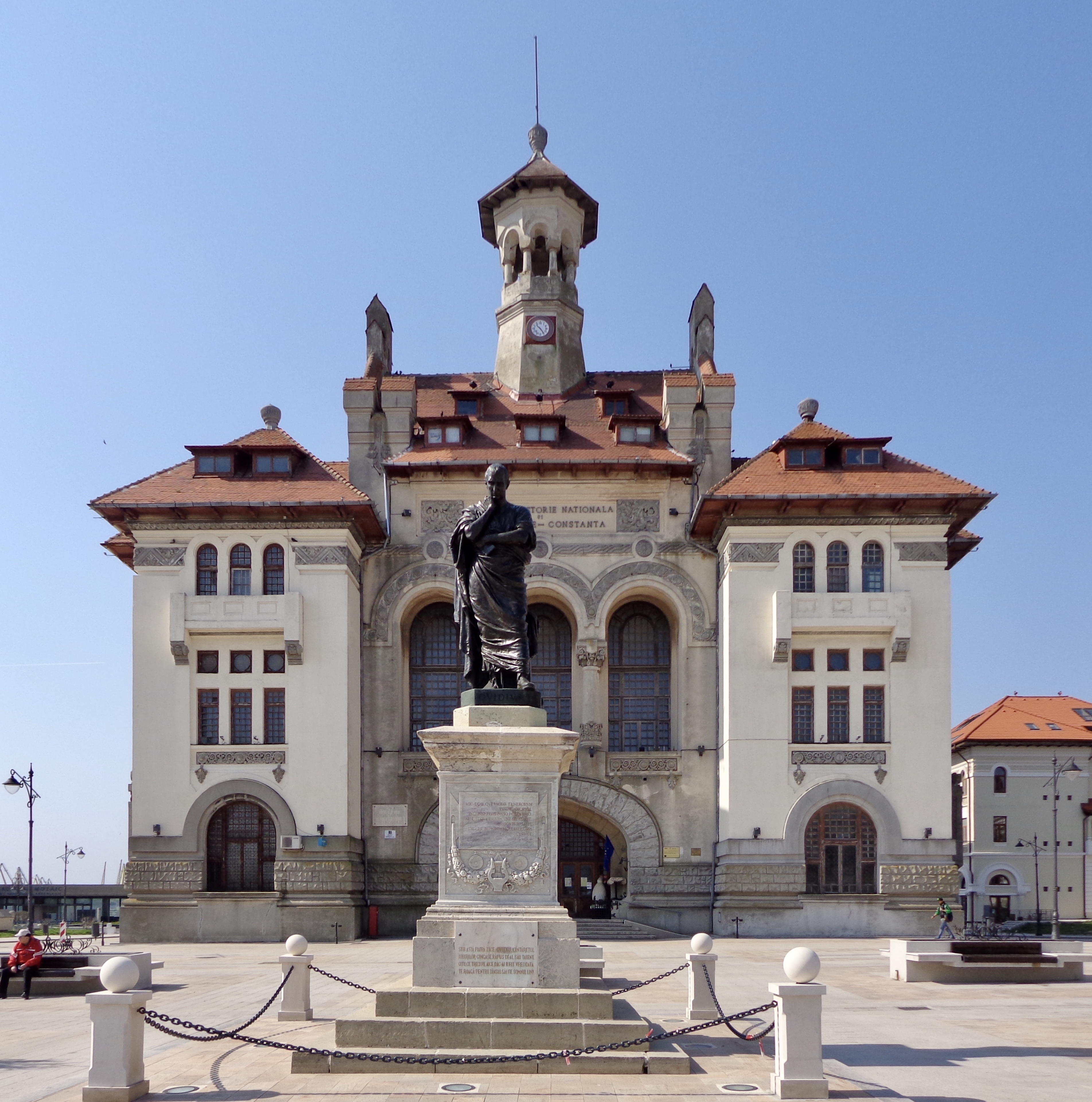 Muzeul de Istorie Nationala si Arheologie Constanta